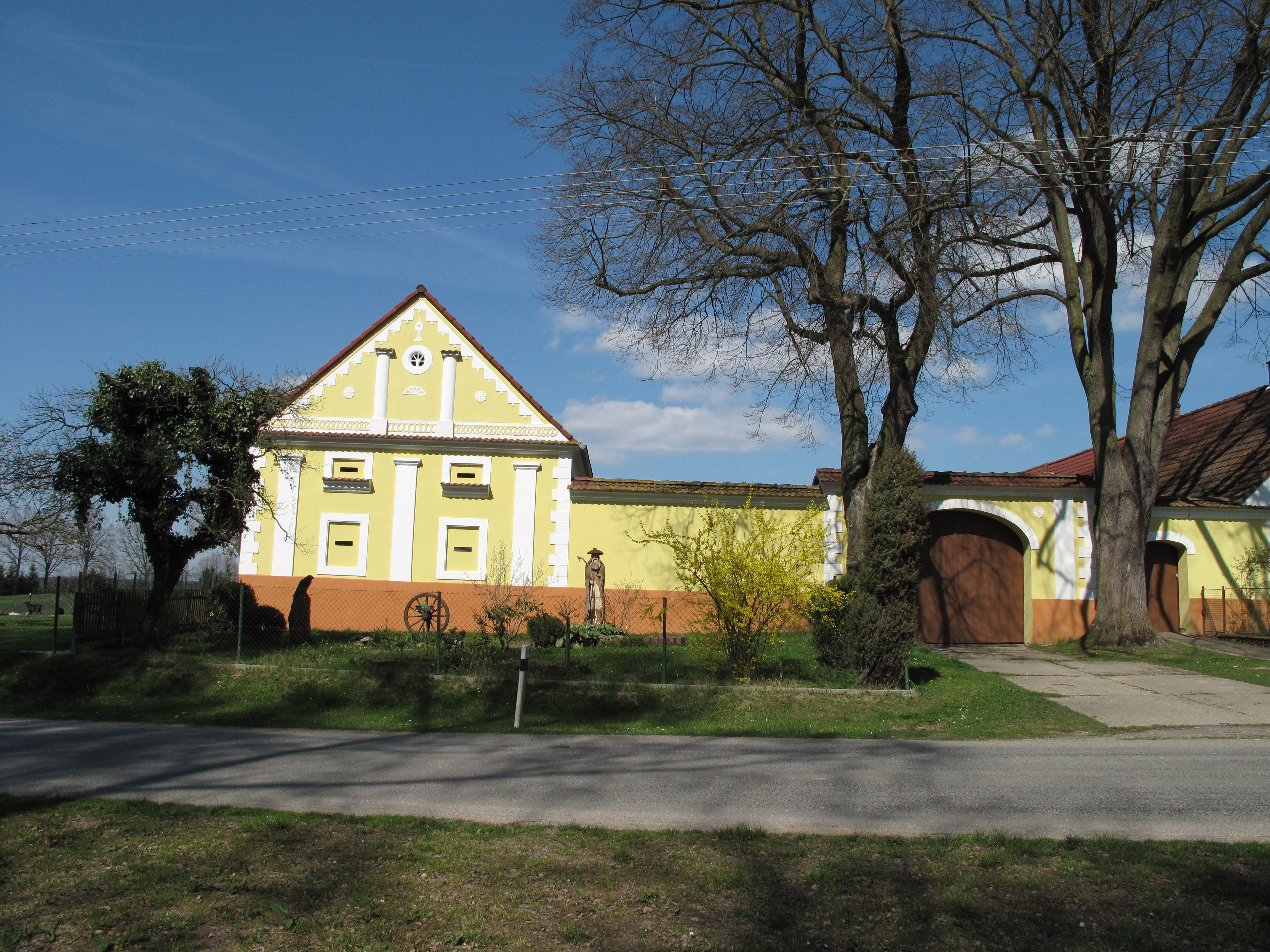 Statek ve Štipoklasech. Okres České Budějovice, Česká republika.